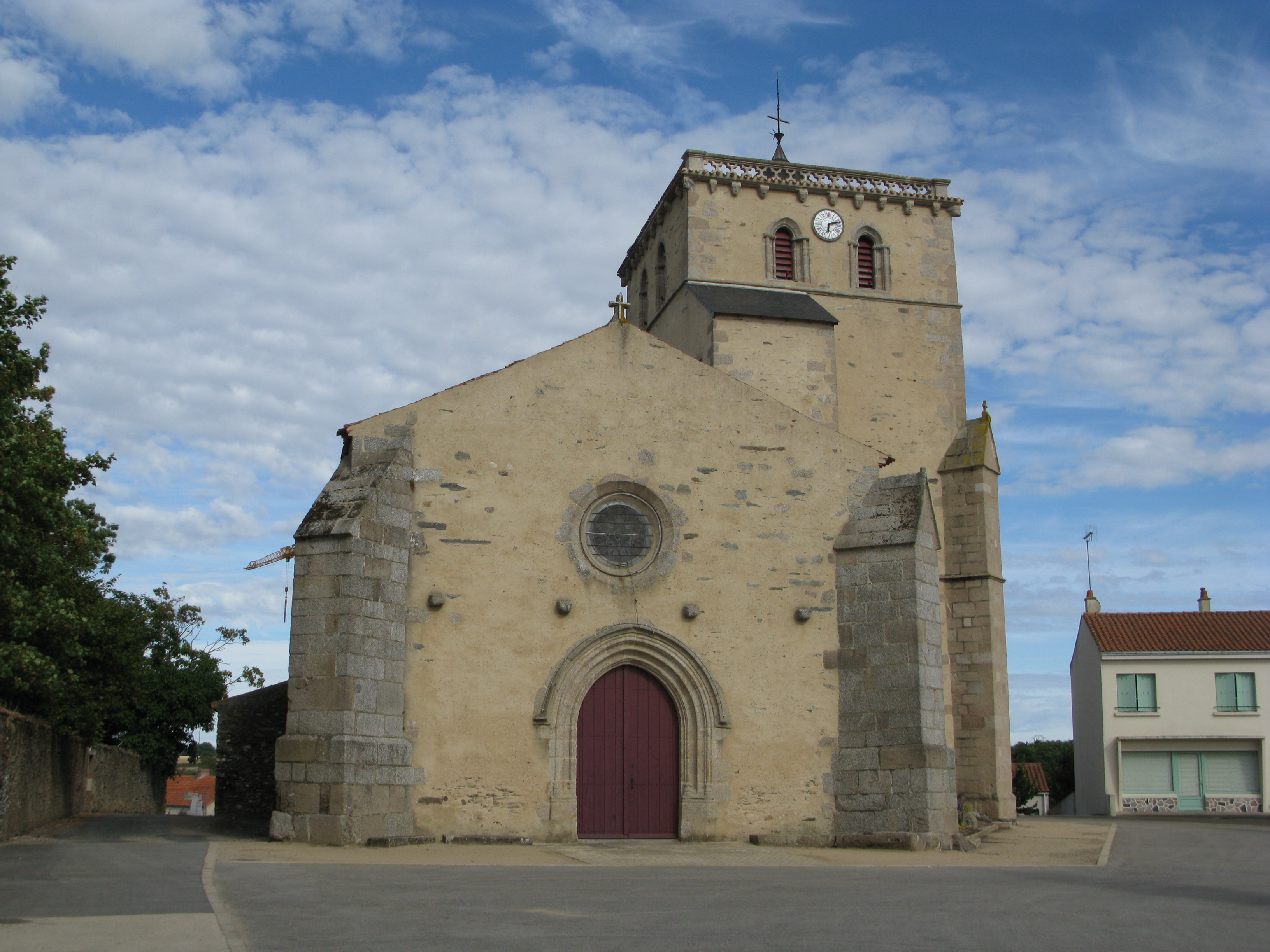 Église de Thorigny